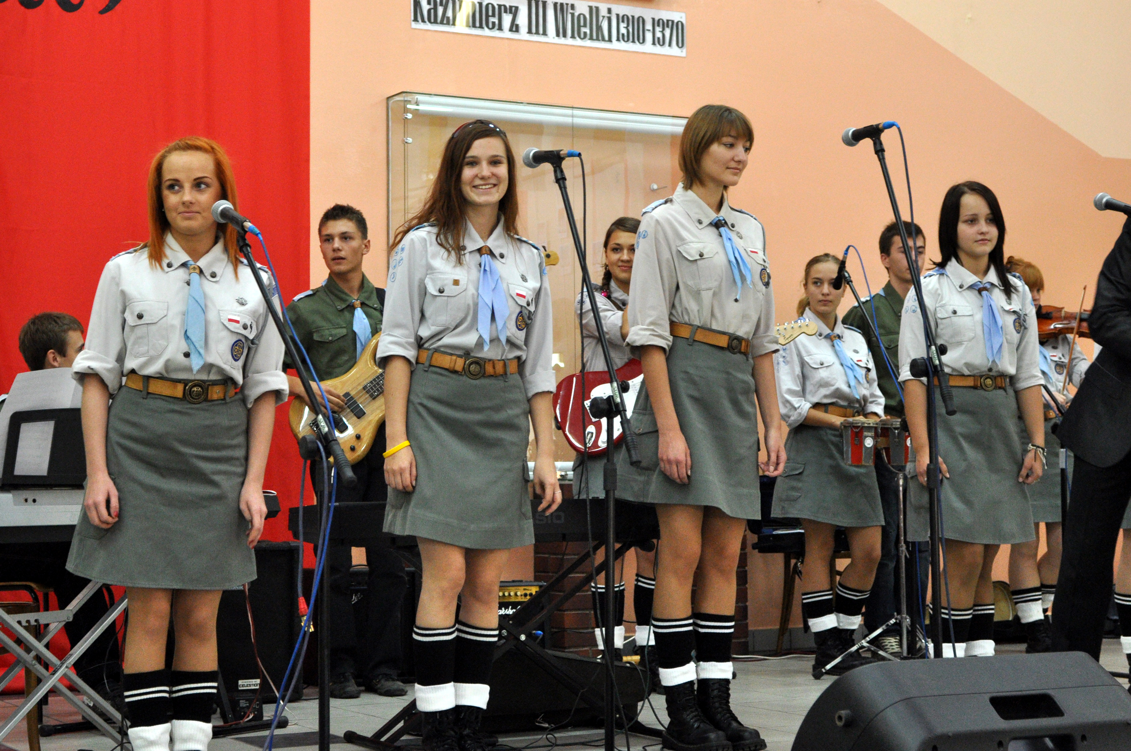 Wartaki